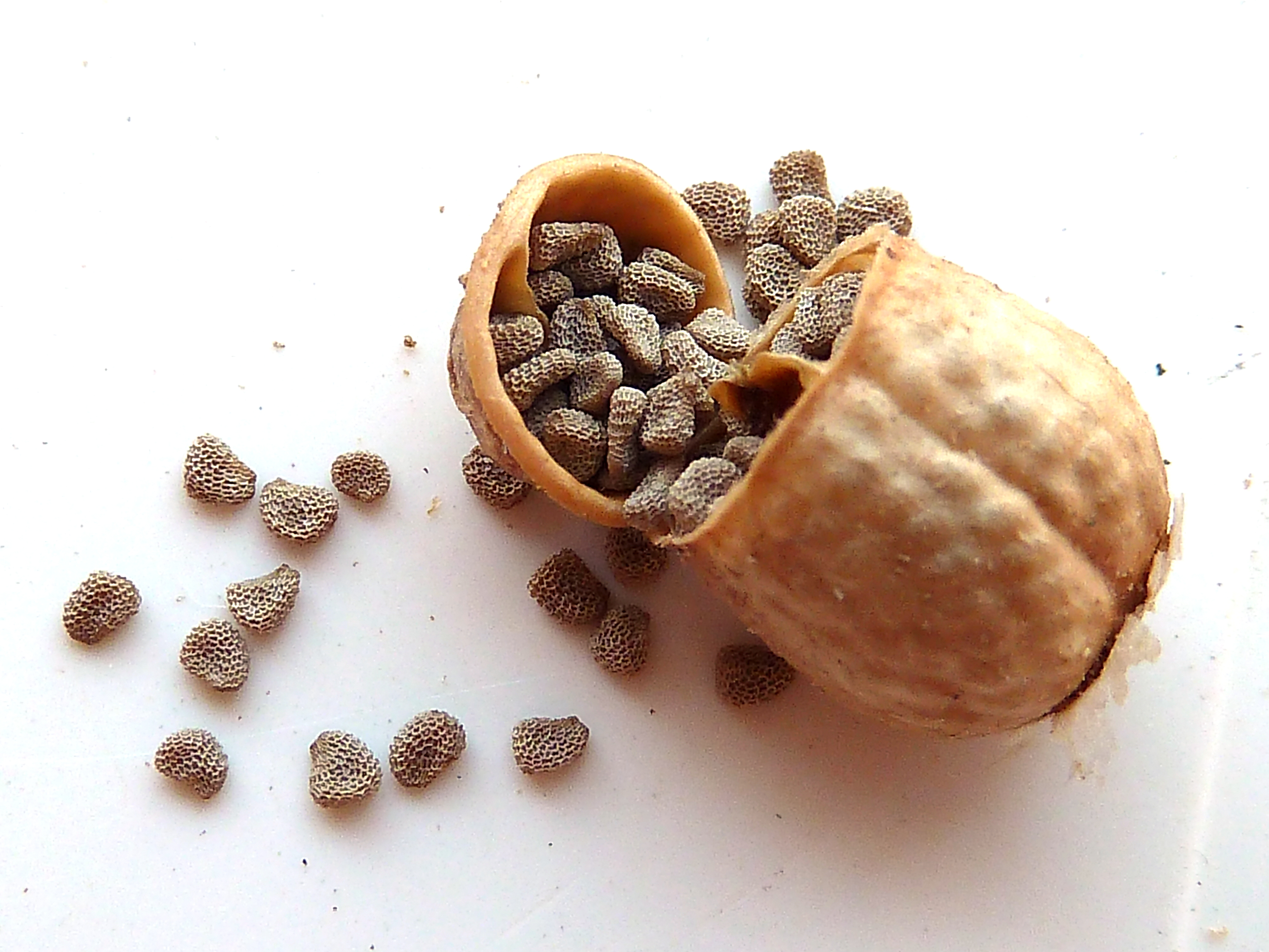 Hyoscyamus albus (Beleño) : Pixidio con semillas - Calle del Puerto de Poniente, Águilas (Murcia, España).